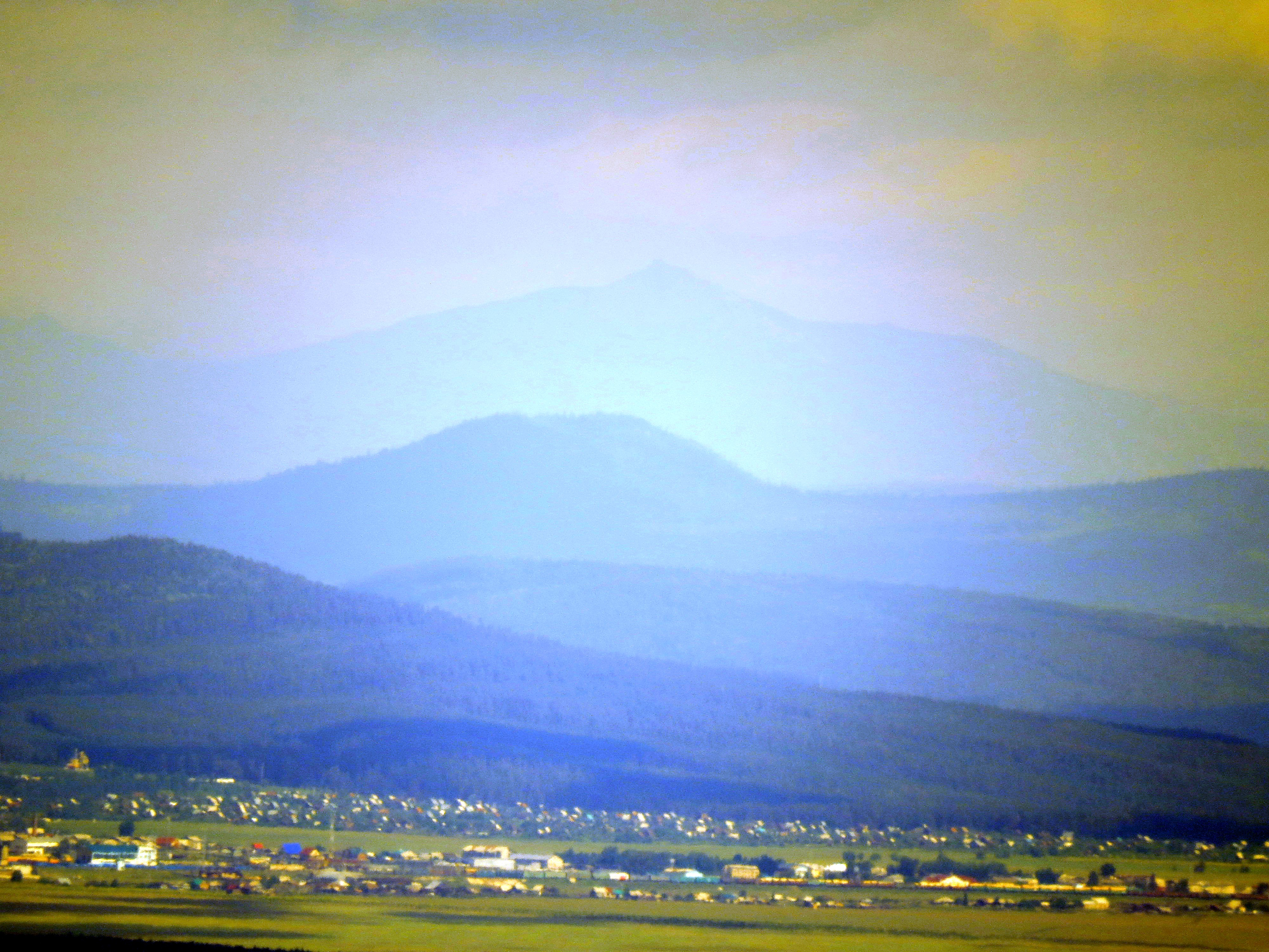 Вид с Кагаташа на гору Большой Кумардак (1318,2 м)